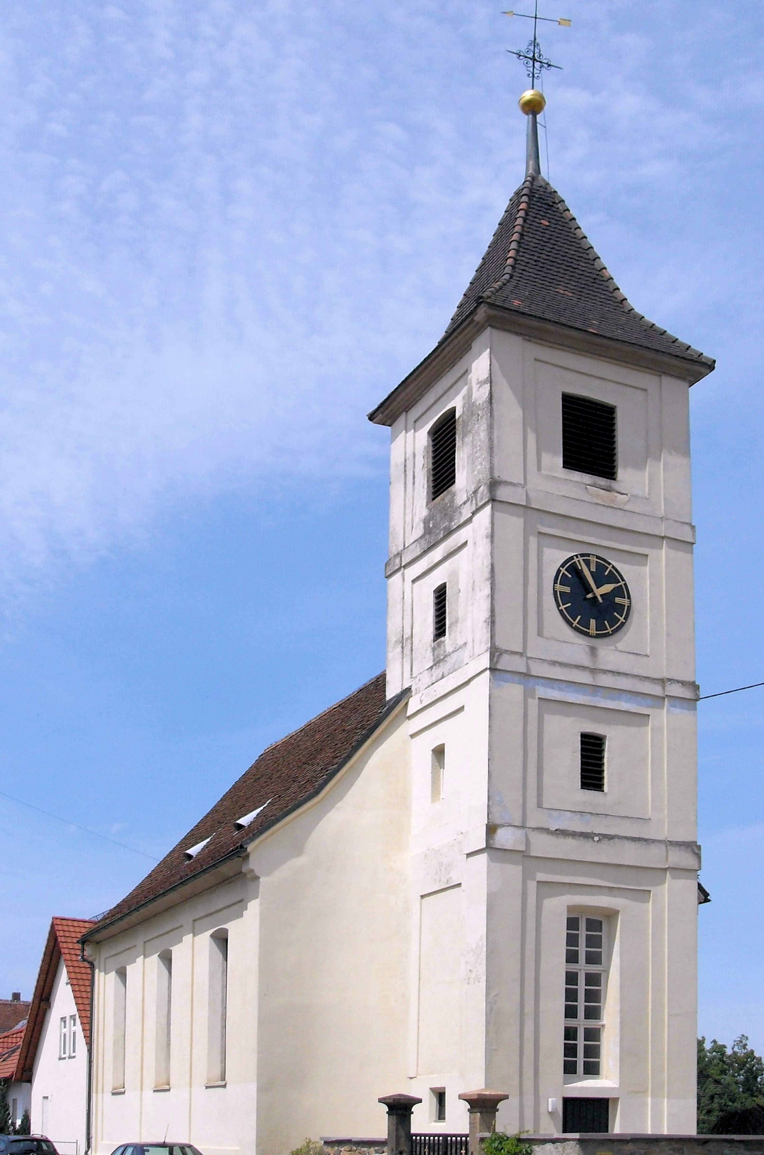 evang. Kirche in Seefelden, Gemeinde Buggingen